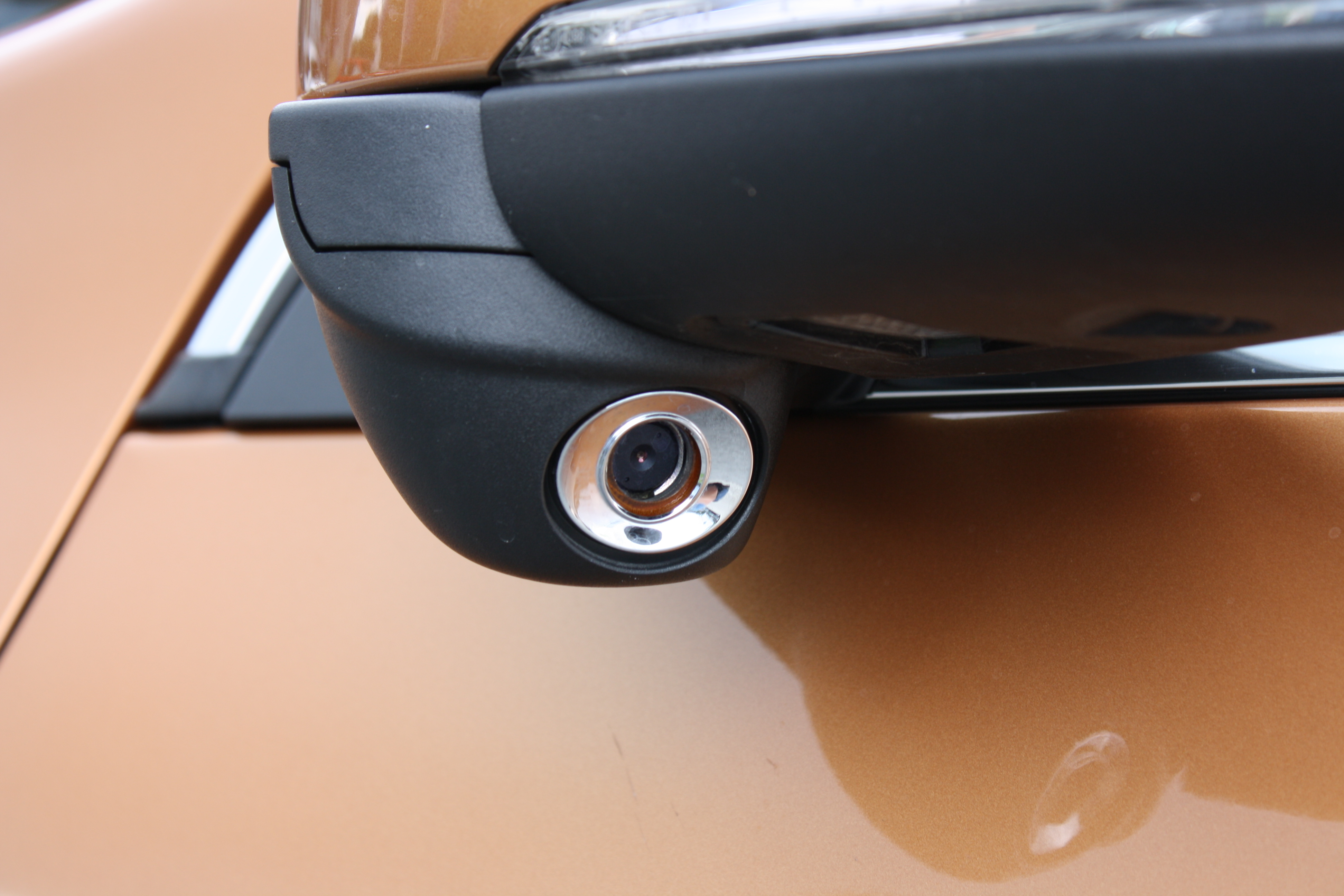 Side camera of Volvo S60